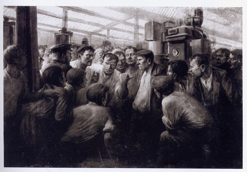 A painting by Mikhail Antonov (1871-1939). 1938.